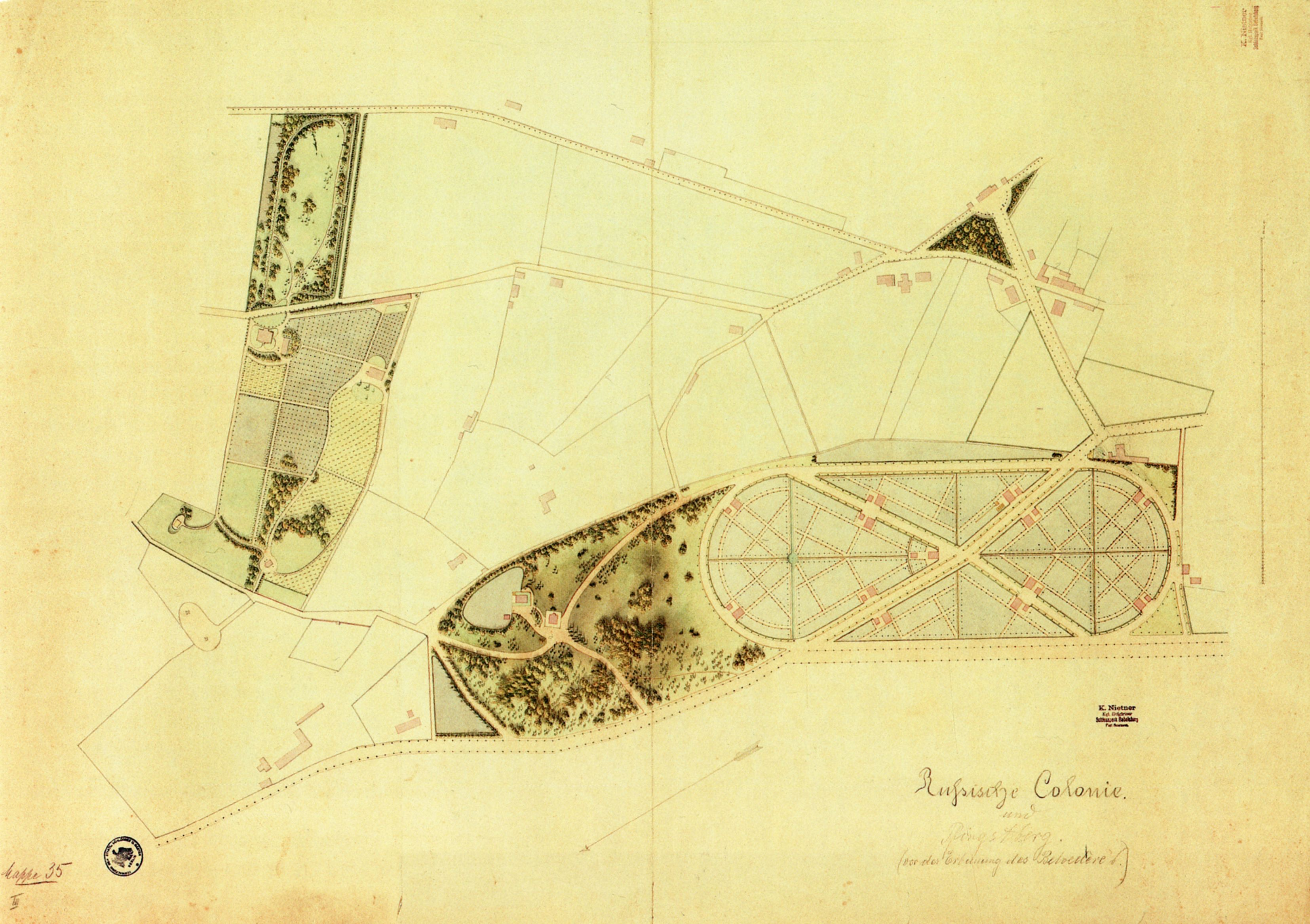 Potsdam - Bestandesplan Russische Kolonie und Pfingstberg Feder in Grau, mehrfach laviert